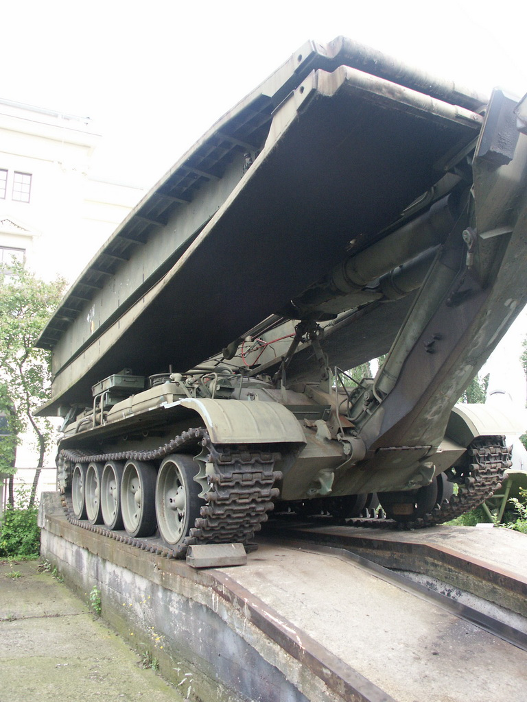 Bundeswehrmuseum Dresden mit Teilen von der NVA. Das Bild zeigt den Brückenlegepanzer BLG-60M2 auf einem T-55A-Fahrwerk.